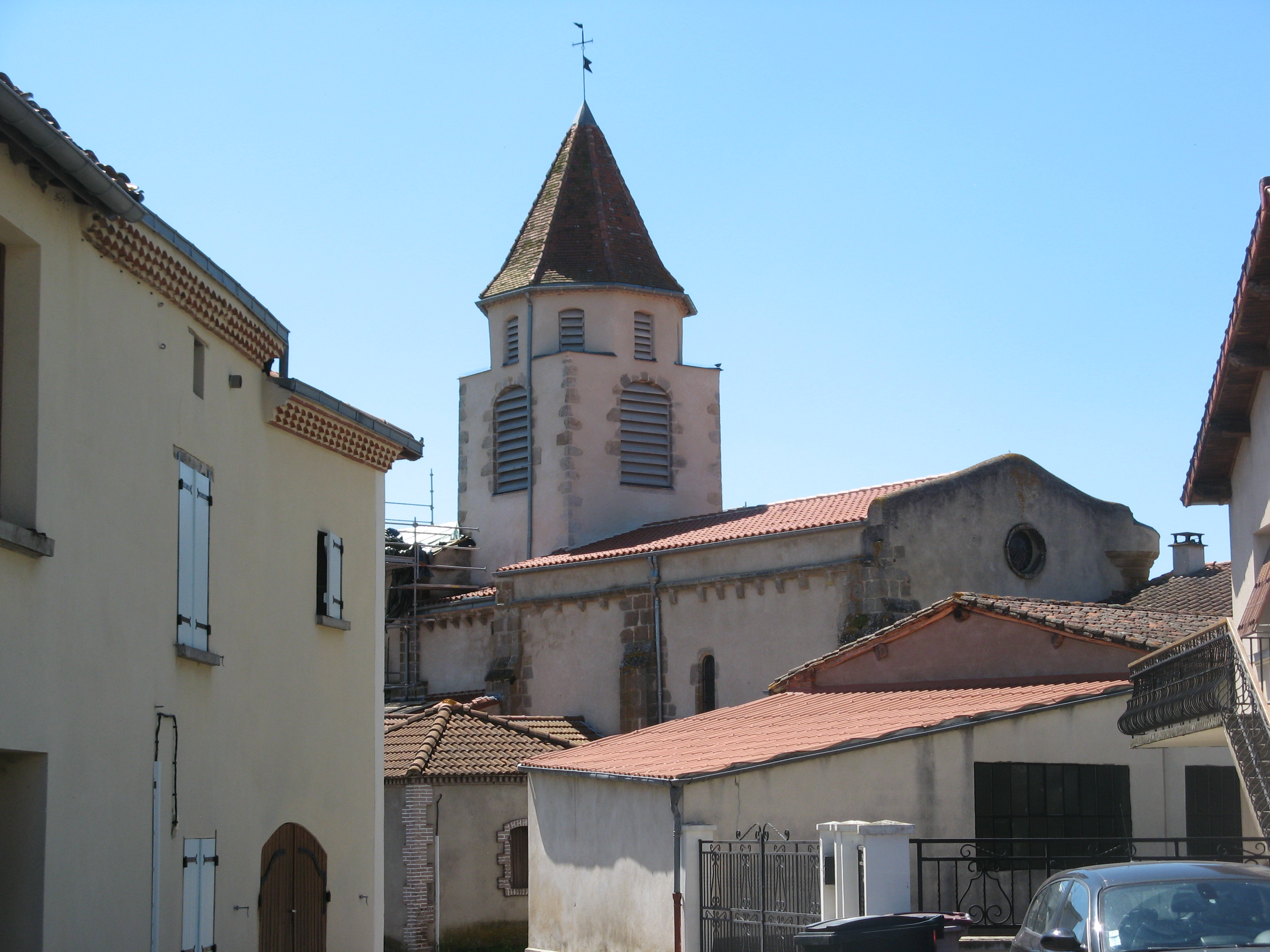 Brenat, église Saint-Barthélémy vue du nord. .